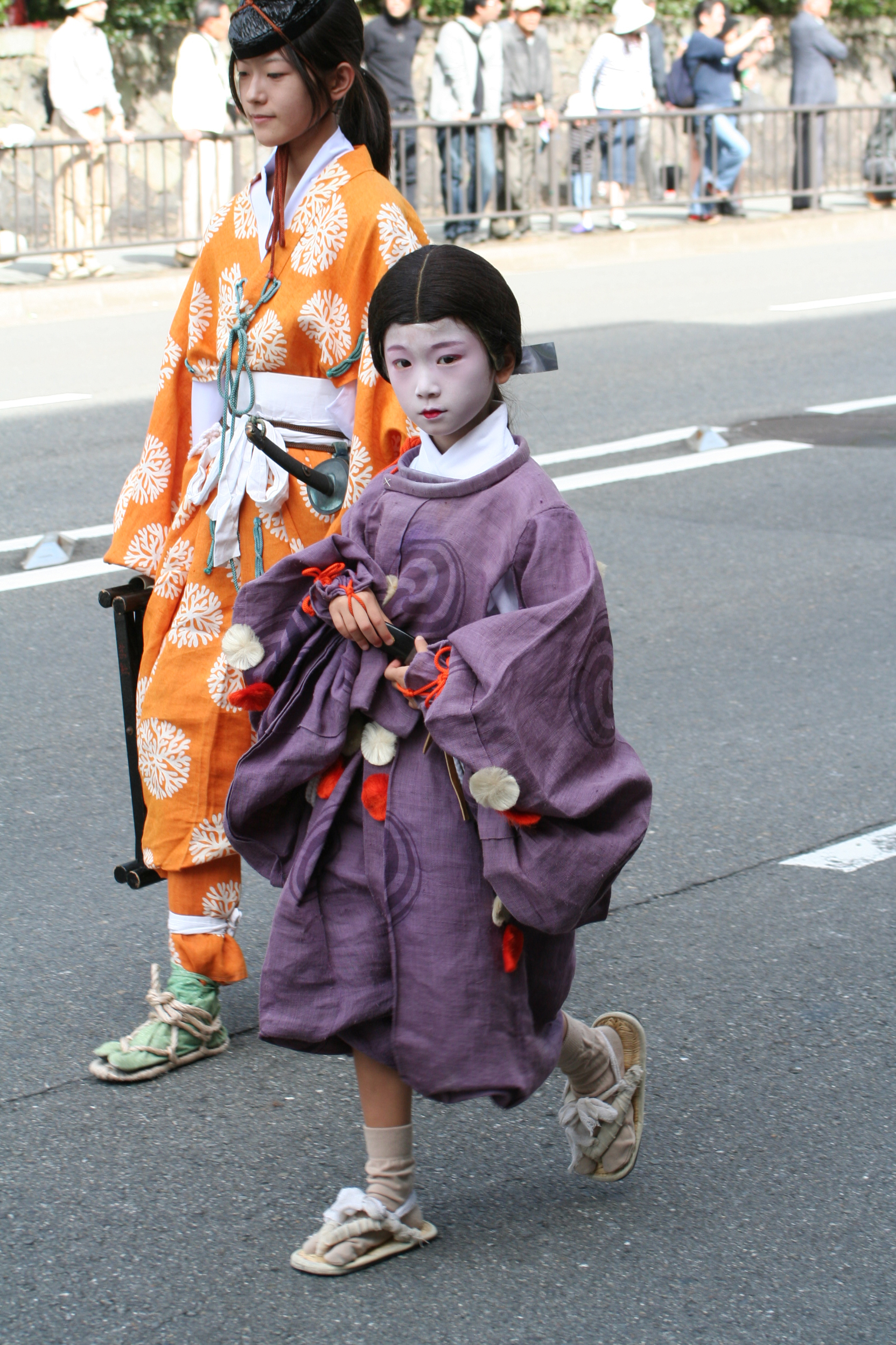 京都府京都市にて開催された時代祭。正午の御所から平安神宮までの行進の様子。2009年10月22日撮影。